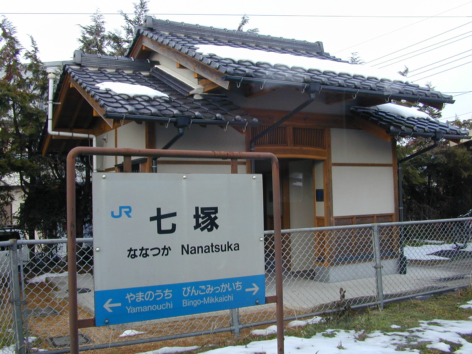 Nanatsuka Station